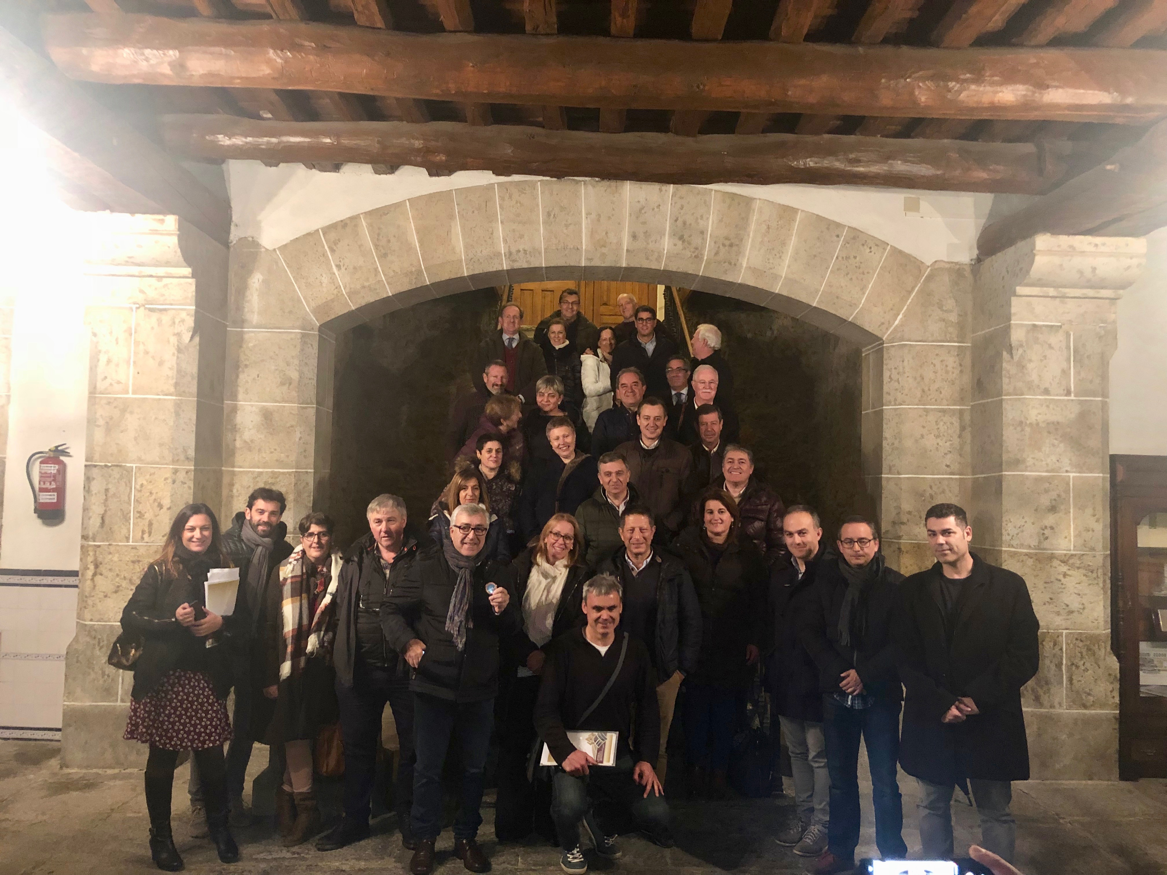 Reunión de los alcaldes de Los Pueblos más Bonitos de España. Noviembre de 2018